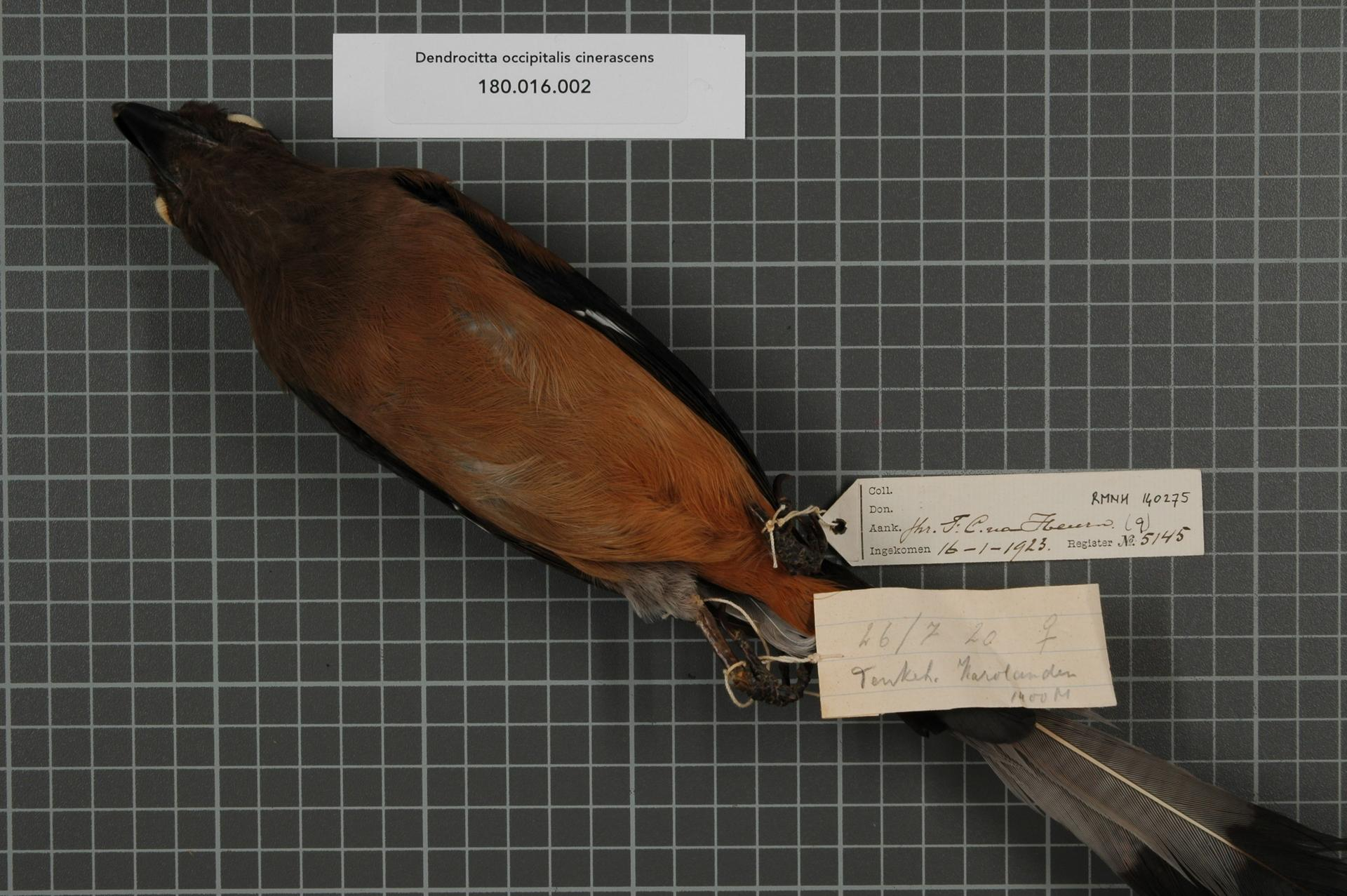 Dendrocitta occipitalis cinerascens Sharpe, 1879